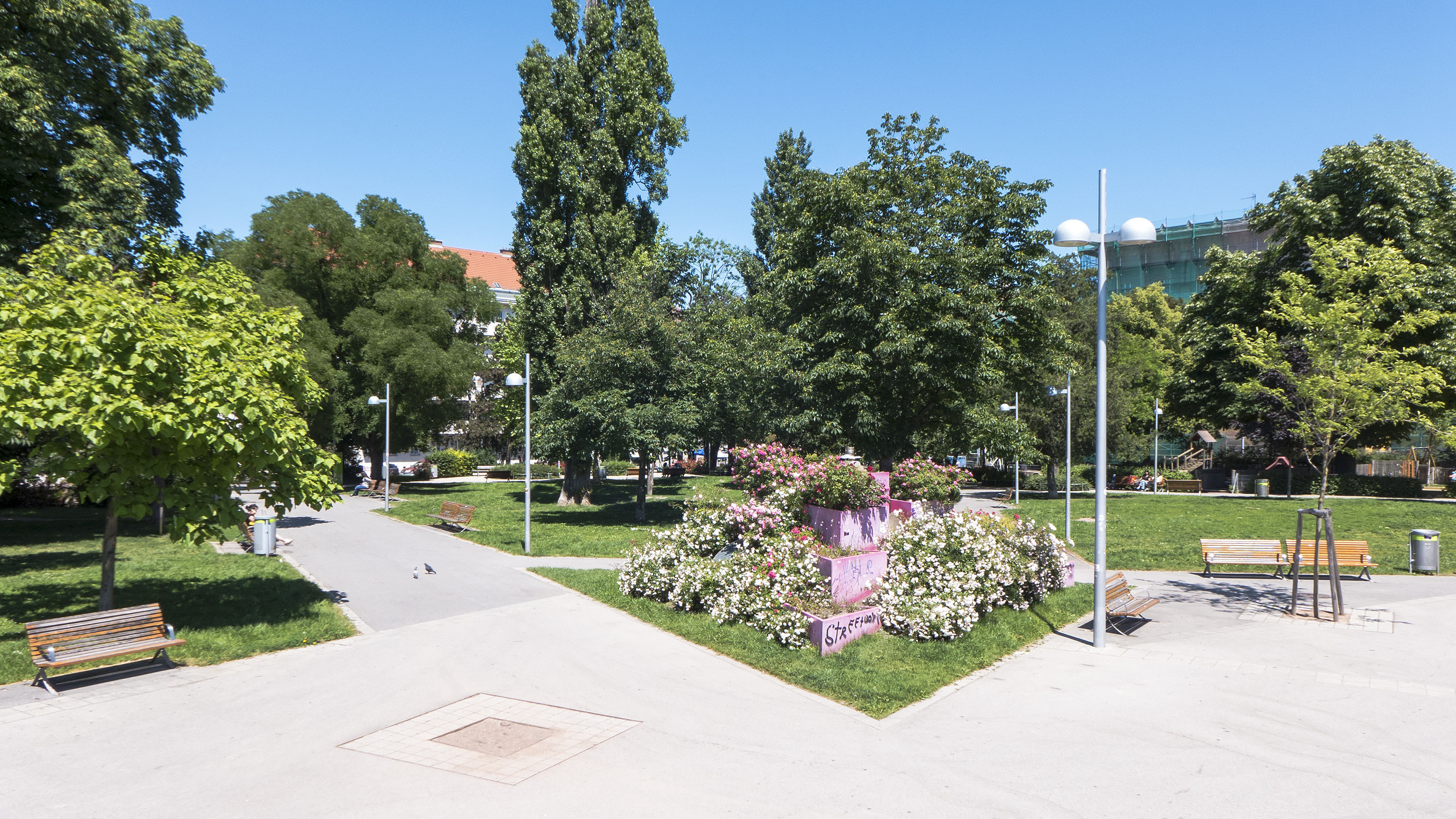 Märzpark in Wien 15